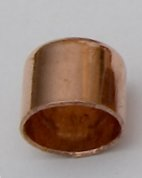 Kupferfitting Typ 5301: Kappe